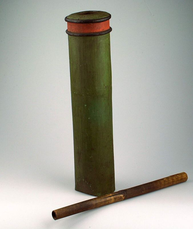 Blaasinstrument. Blaasinstrument van bamboe Unknown language: Serbung